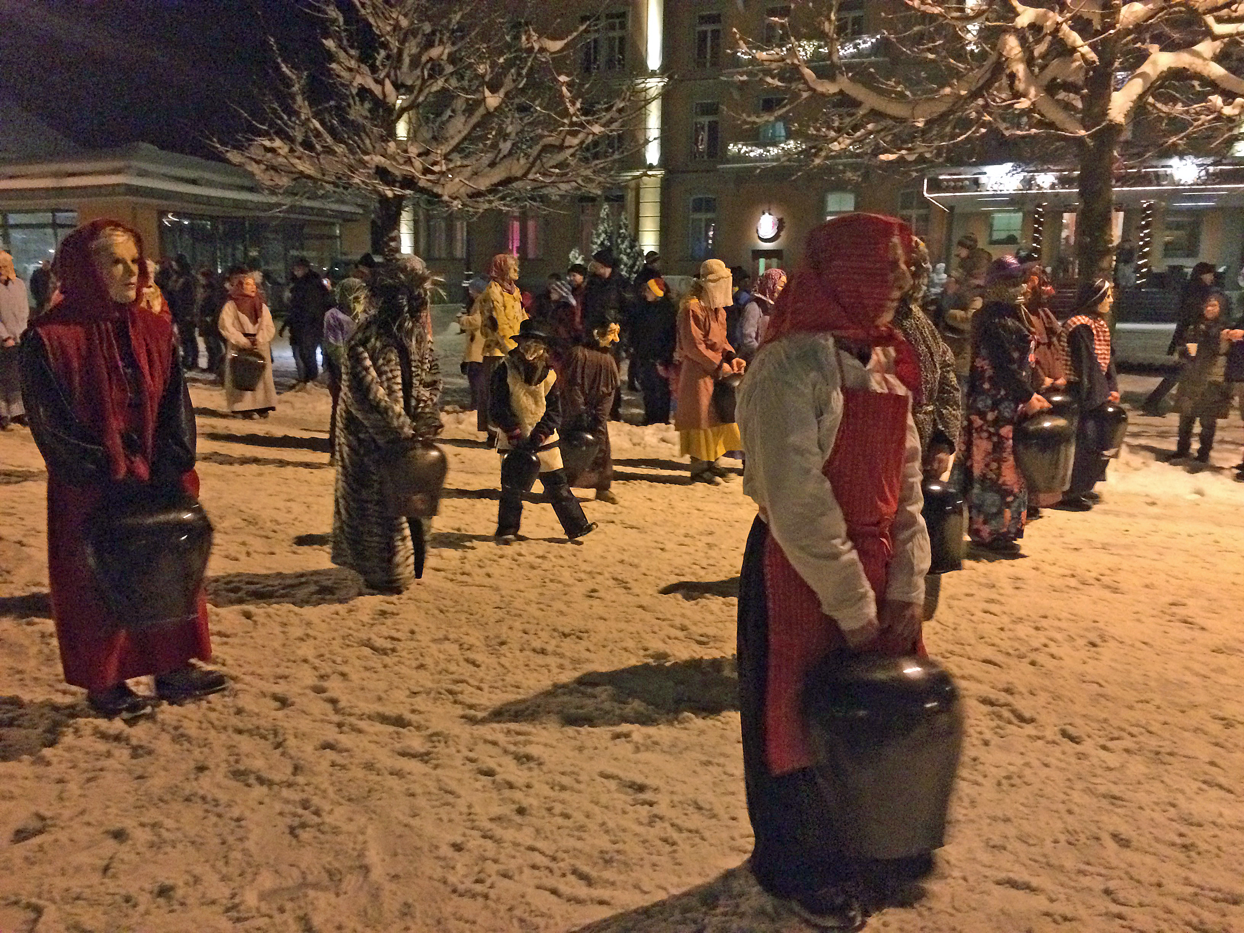 Ubersitz in Meiringen (30. Dezember 2014) – Trychlerumzug